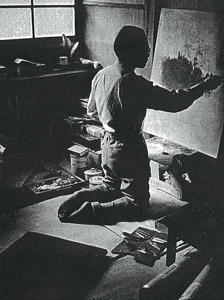 日本の現代美術家、斎藤義重